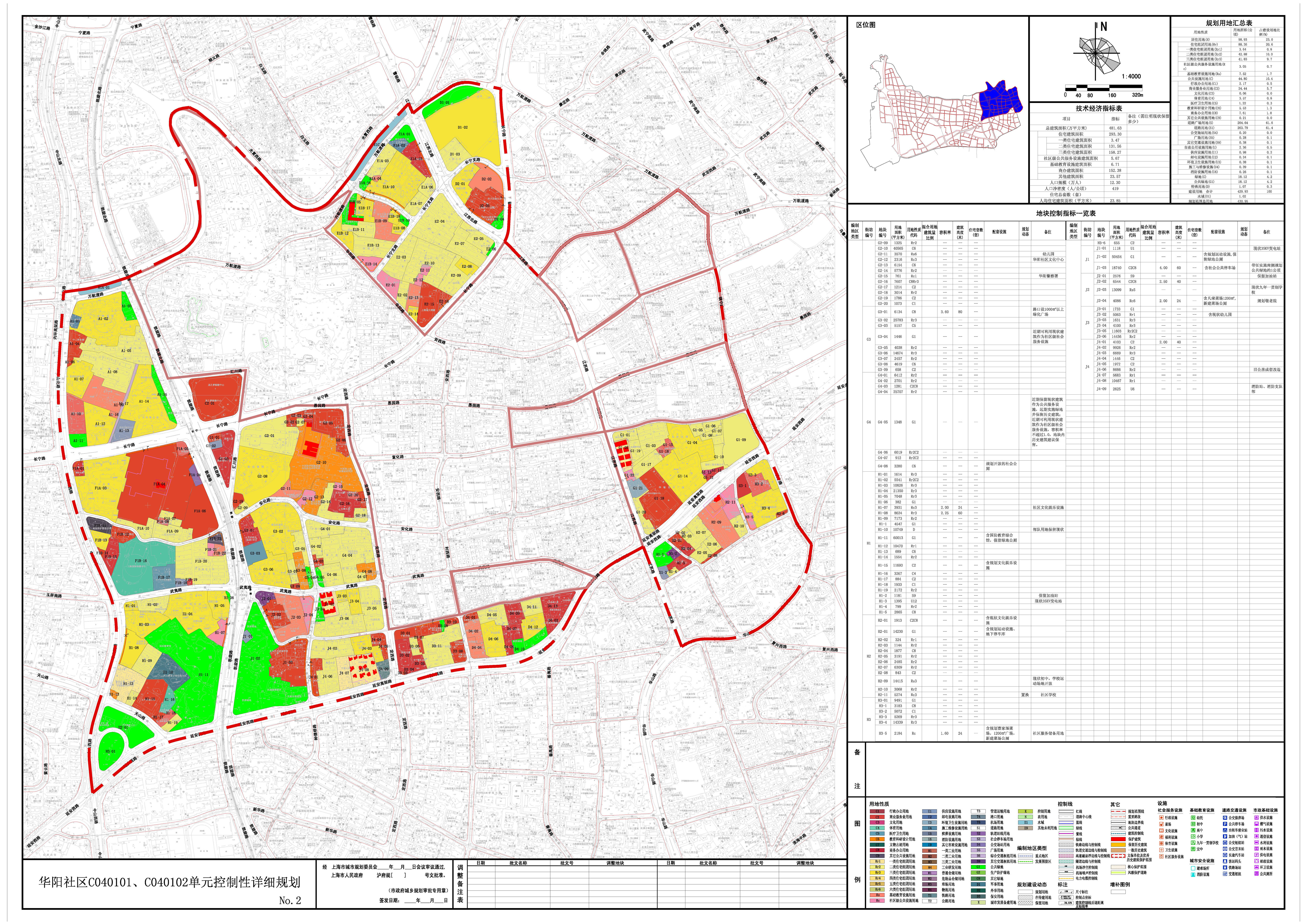 中文（中国大陆）: 华阳社区C040101编制单元控制性详细规划，图则2